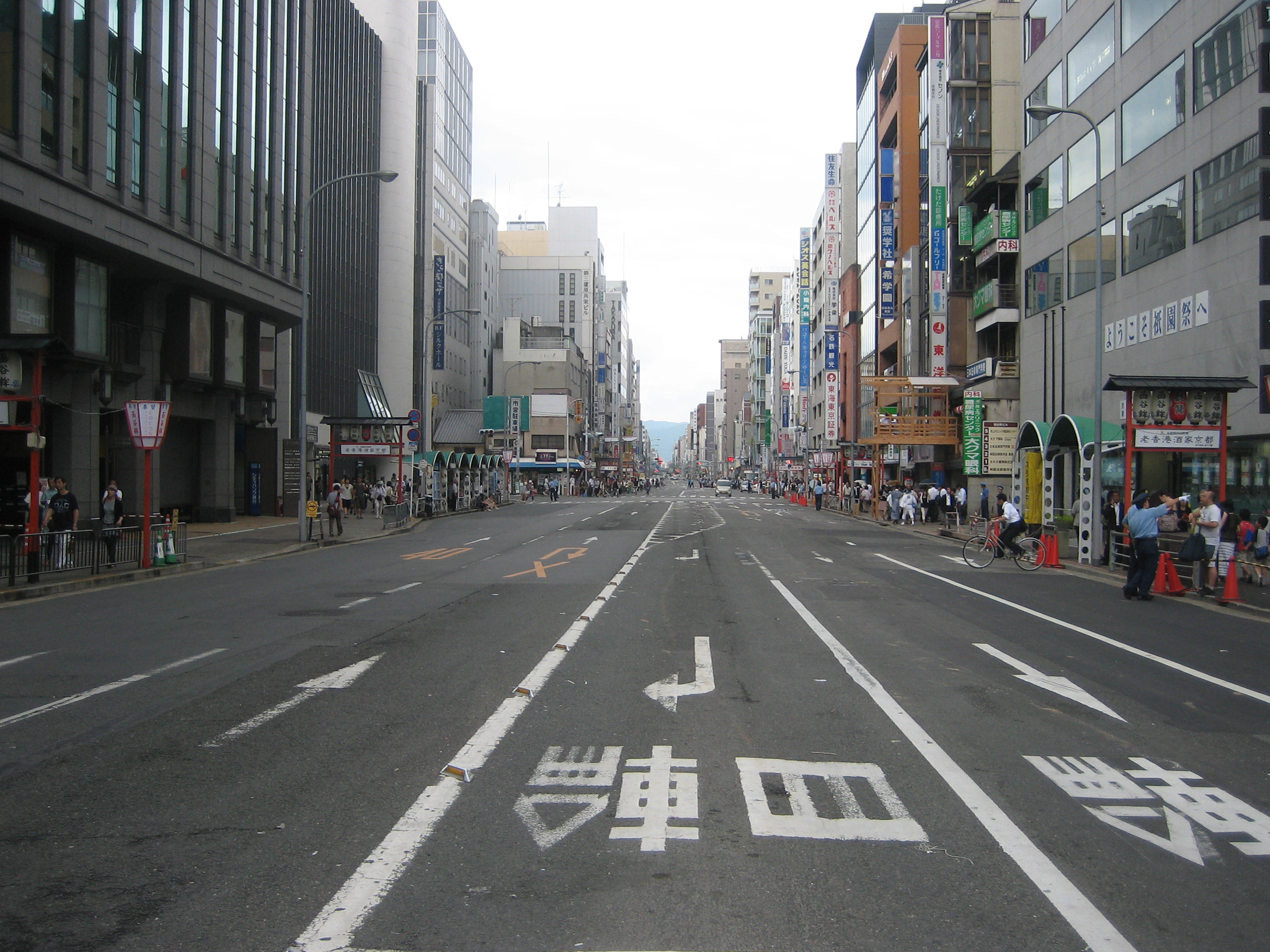 2009年7月17日に京都市で行なわれた祇園祭山鉾巡行の様子。 交差点中央付近から四条通を西へ向かって撮影。